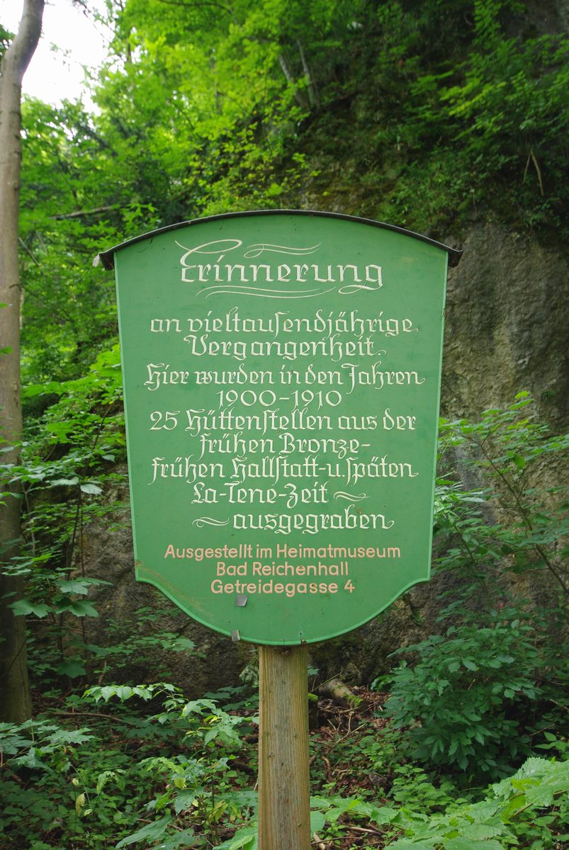 Hinweistafel vorgeschichtliche Siedlungen in Karlstein